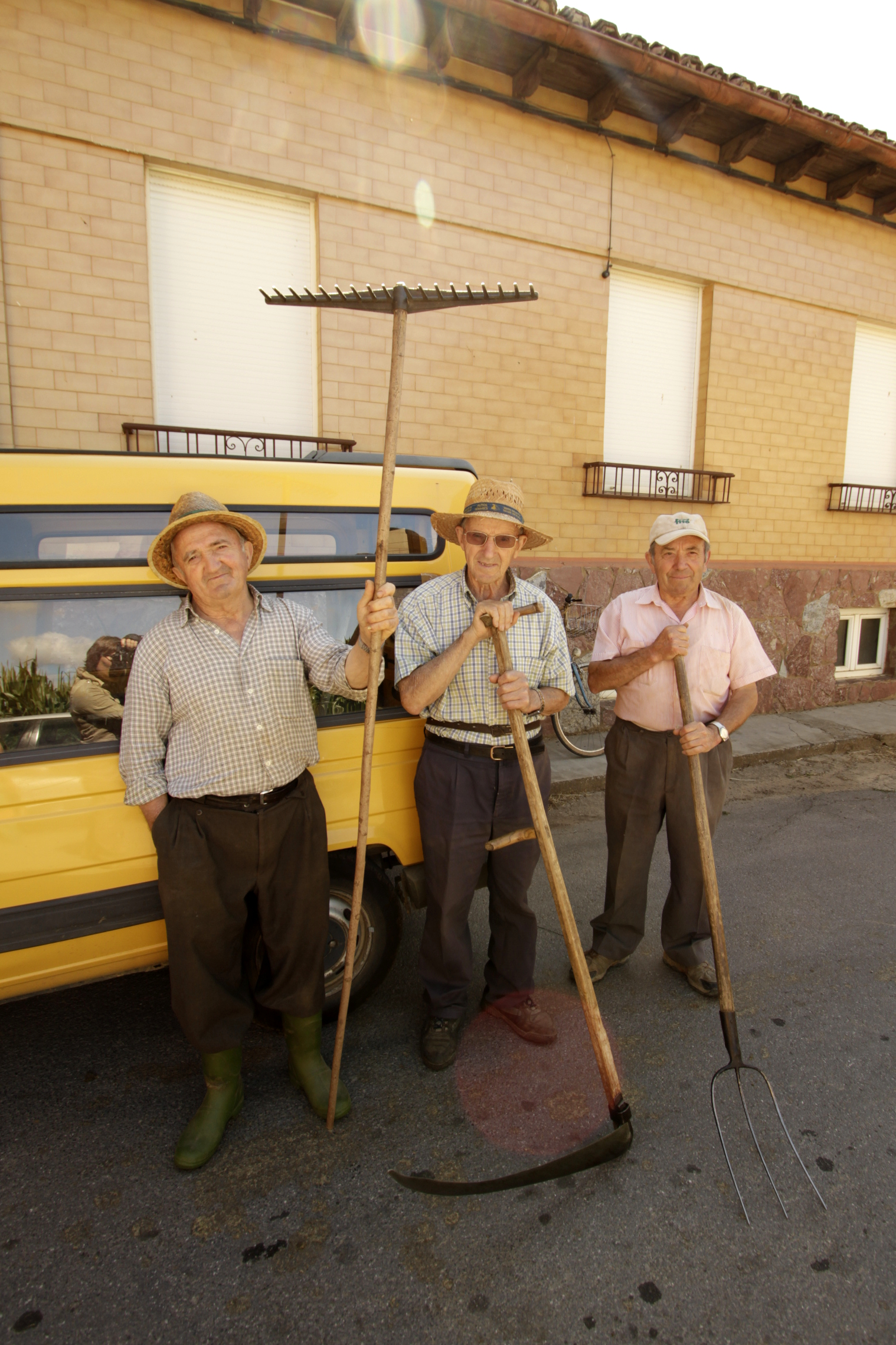 Foto realizada durante una hacendera de Villanueva del Condado para las grabaciones del documental La voz del concejo, de Isabel Medarde y Teresa García Montes